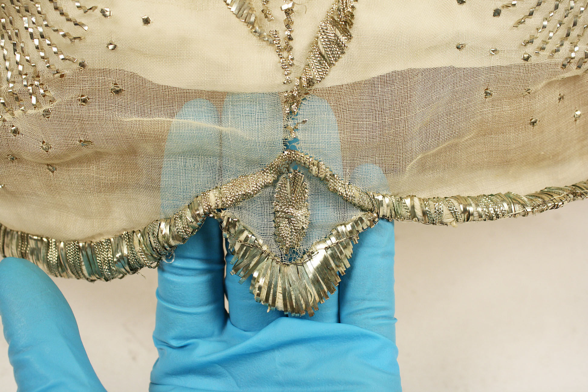 French; Evening dress